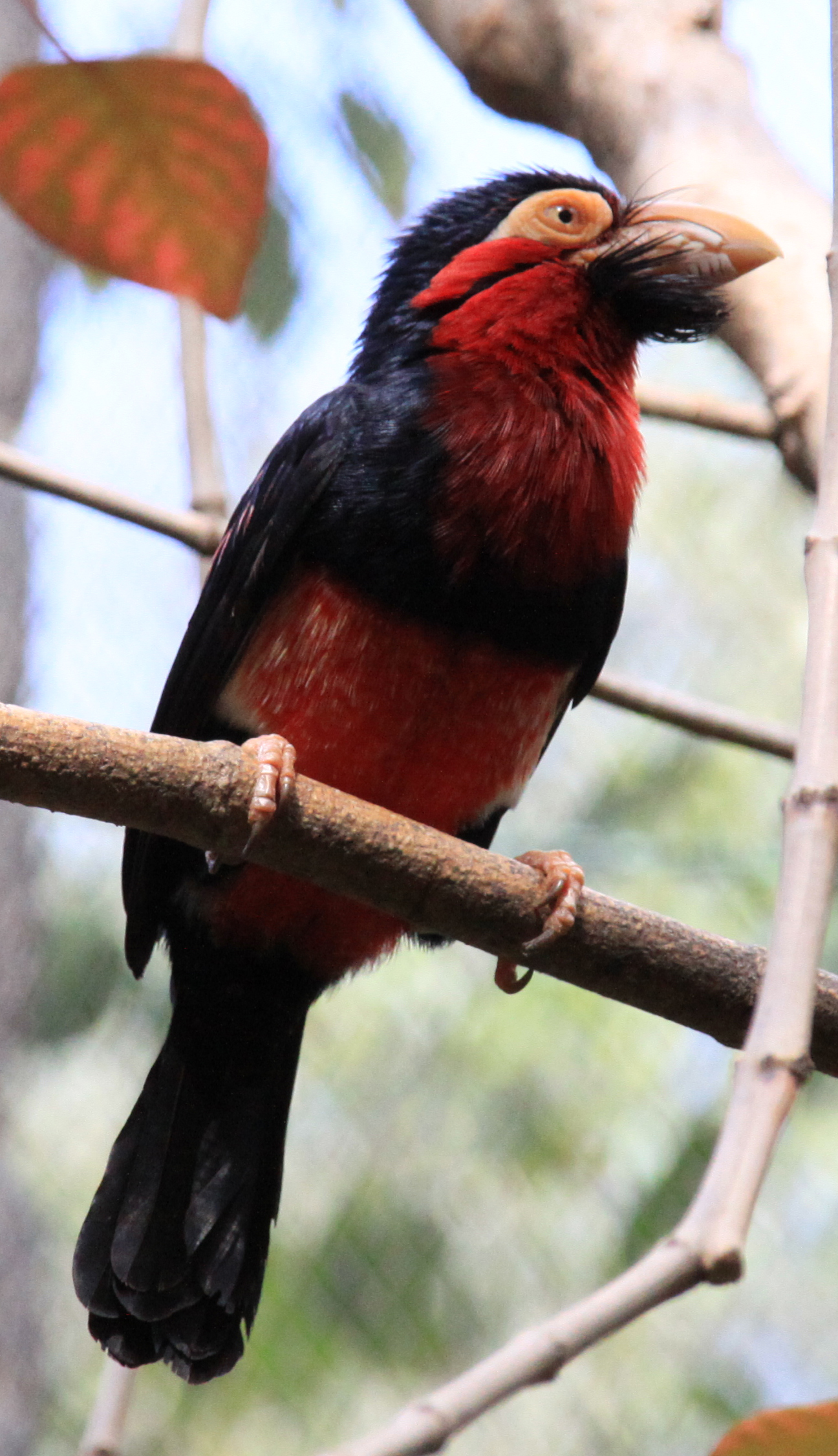 Bearded Barbet (Lybius dubius)